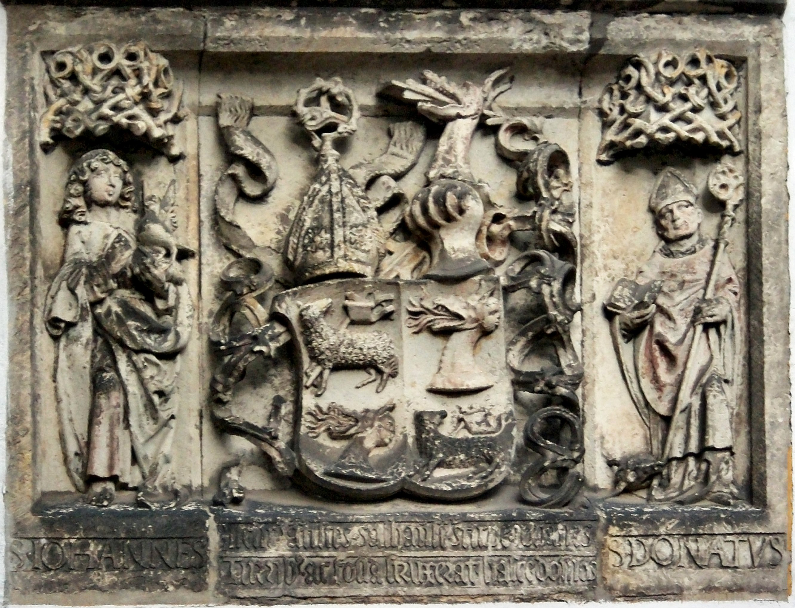 Wappen am Eingang zum Schloß Wurzen, dem ehemaligen Bischofssitz.